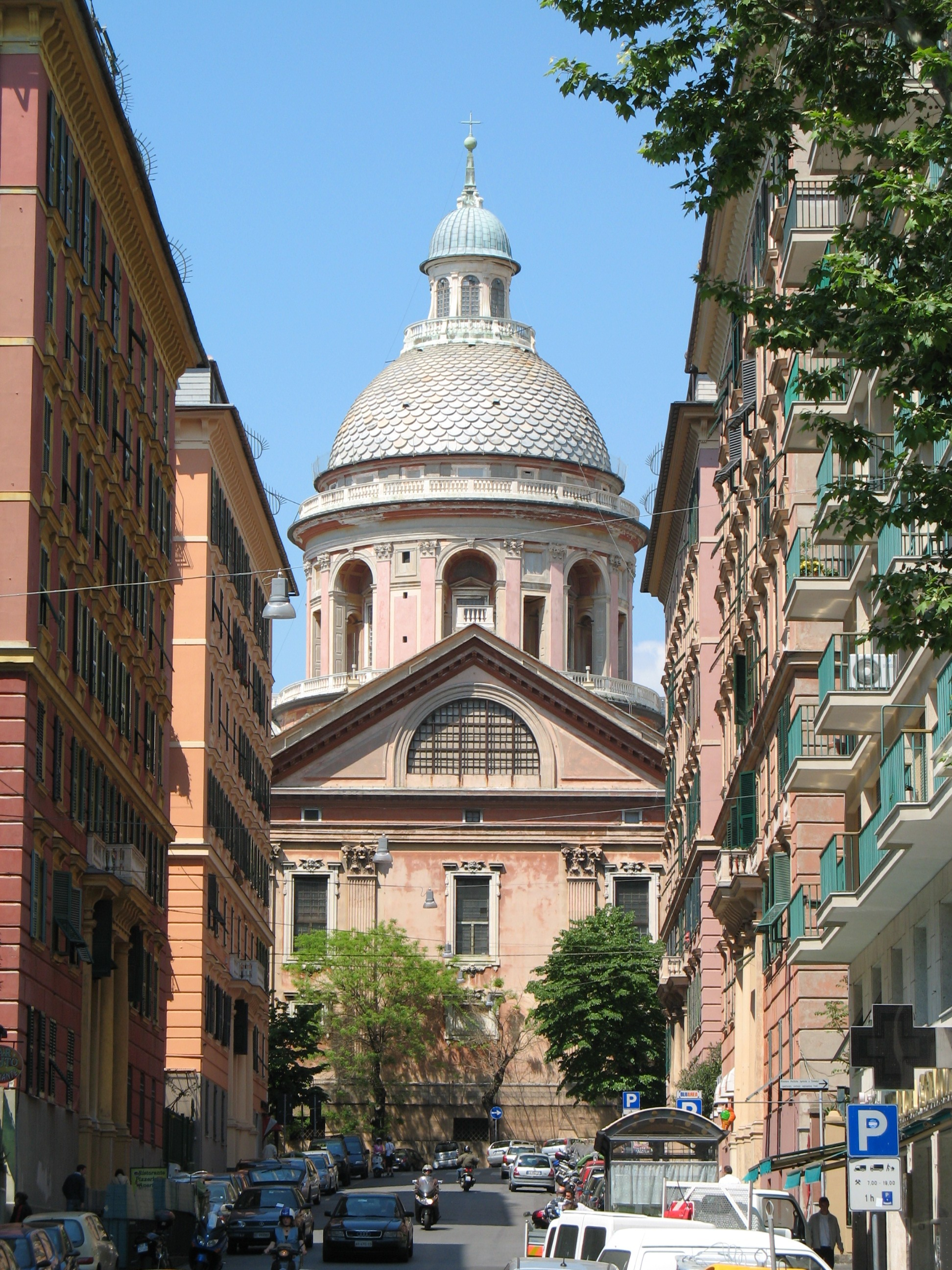 Genova, quartiere di Carignano, Basilica di Santa Maria Assunta di Carignano